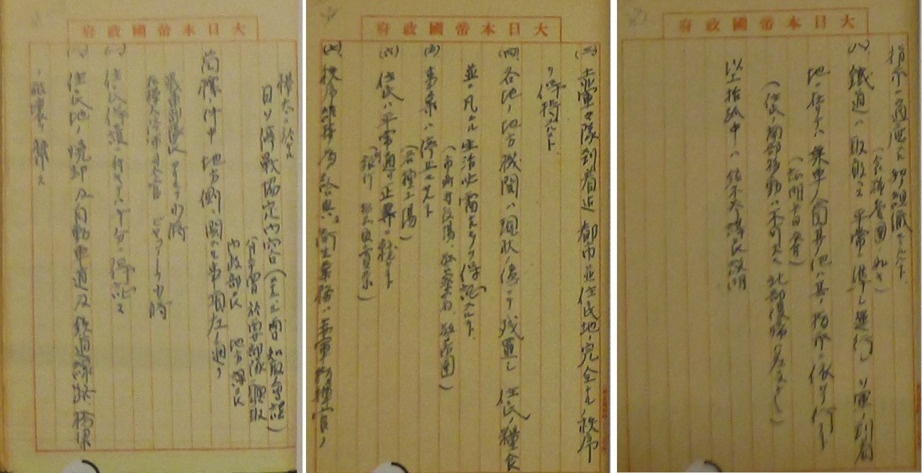 Меморандум губернаторства Карафуто от 24 августа 1945 года о реализации соглашения о капитуляции японцев на Южном Сахалине